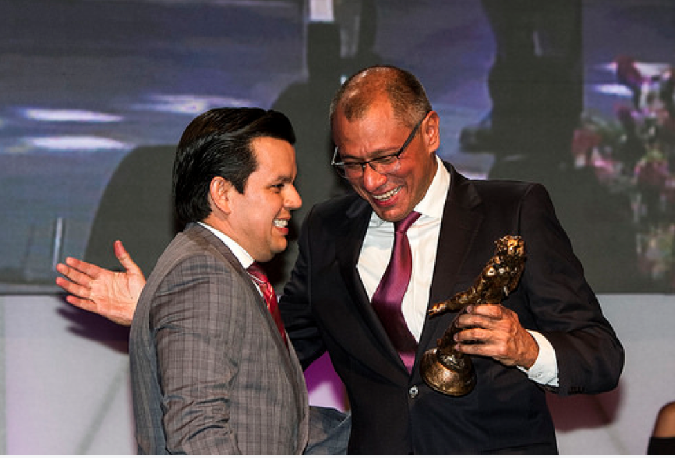 Entrega del premio a la investigación 2016